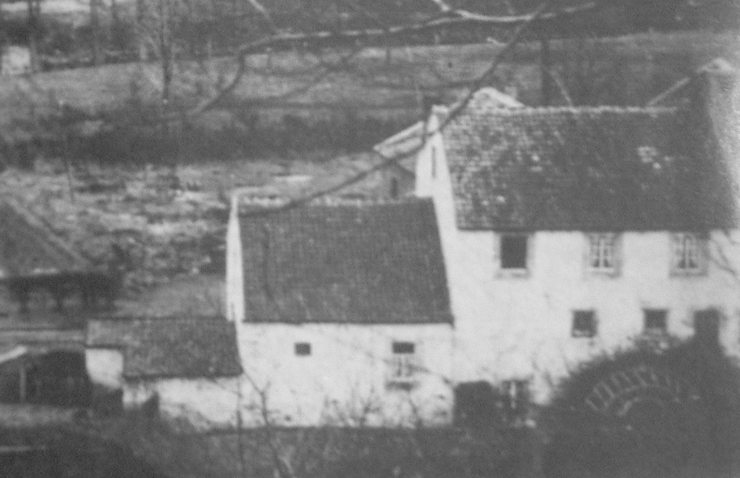 Elgermühle um 1895